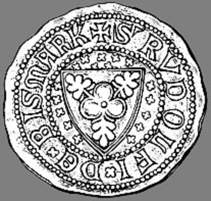 Nachzeichnung eines Siegelabdrucks mit Wappen Bismarck des Knappen Rudolf („Rule“) v. Bismarck (umlaufende Legende in Latein: „+ S' Rudolfi x de x Bismark“); Sohn des Nikolaus („Klaus“) I. von Bismarck (1307–1377), Stendaler Patriziers, Großkaufmanns, Ratsherrn, erzstift-magdeburgischen Stifthauptmanns und markgräflich brandenburgischen Rats und Hofmeisters, und Bruder des Ritters Nikolaus II. von Bismarck (vgl. Adolph Friedrich Riedel, Geschichte des schloßgesessenen adligen Geschlechtes von Bismarck. (= Märkische Forschungen, XI. Band, hgg. vom Verein für Geschichte der Mark Brandenburg), Berlin 1867, S. 205 f.)